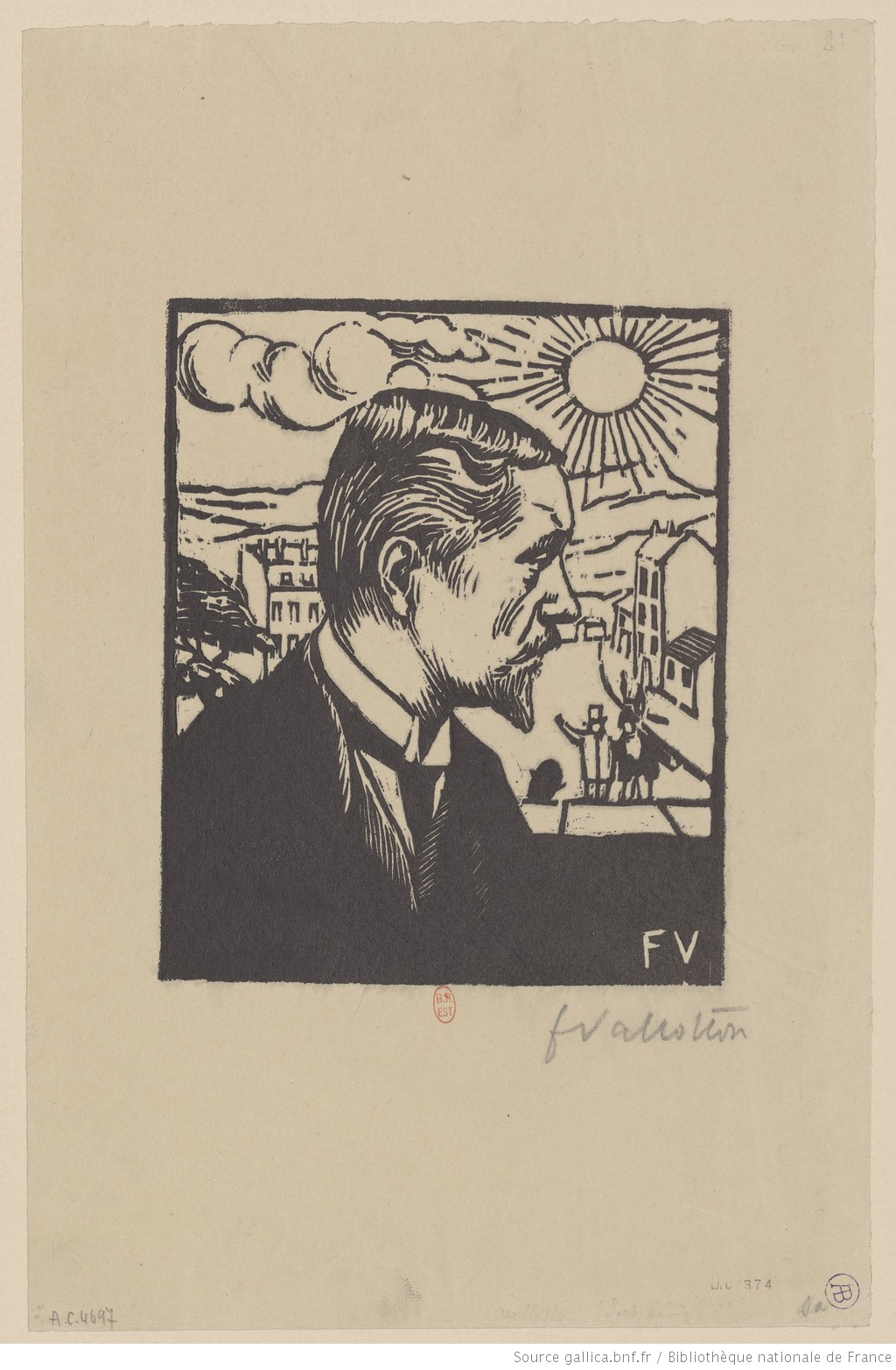 Auto-portrait de Félix Vallotton (1865-1925). bois gravé 131 x 101 mm